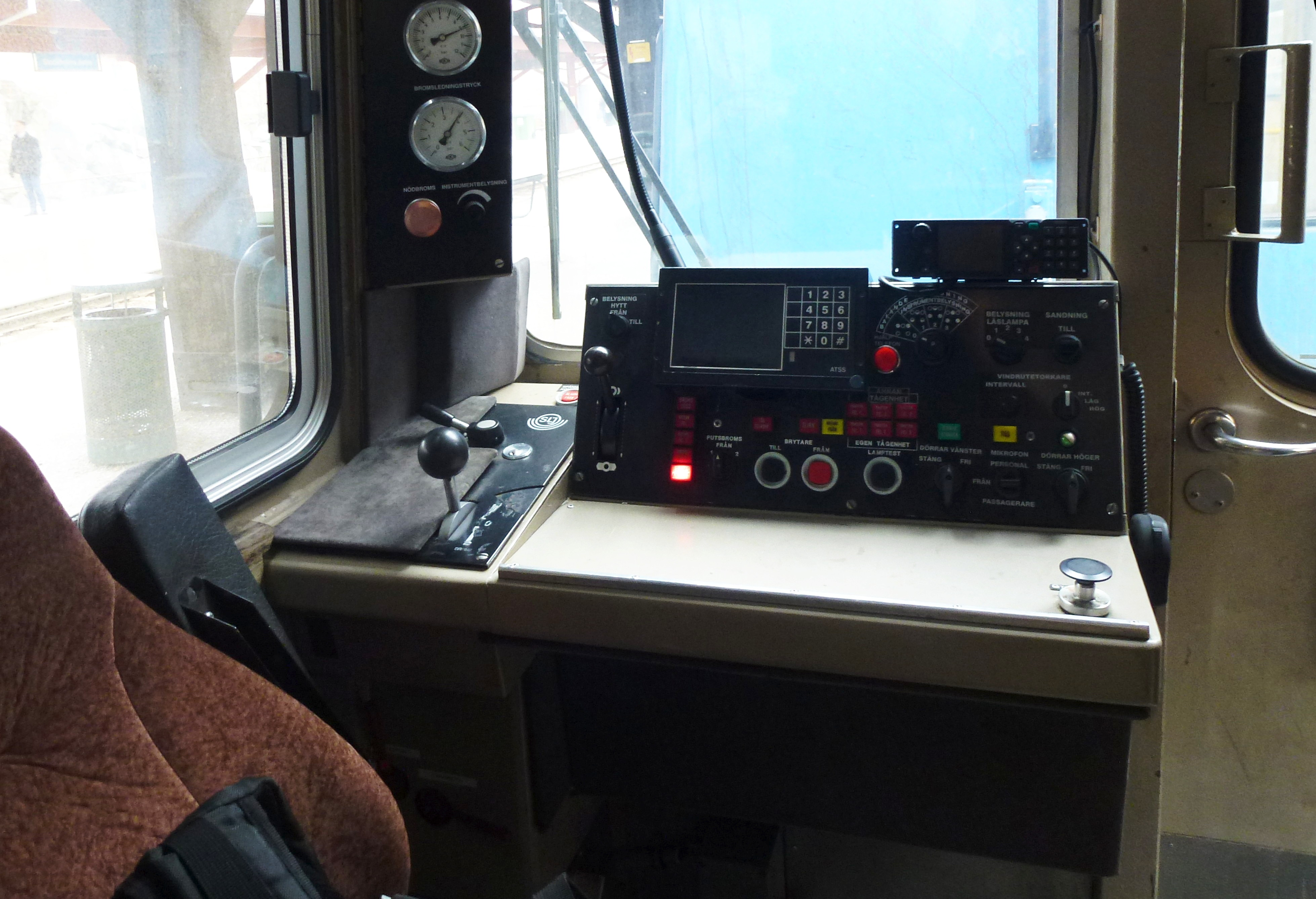 Roslagsbanan interiör, förarplats